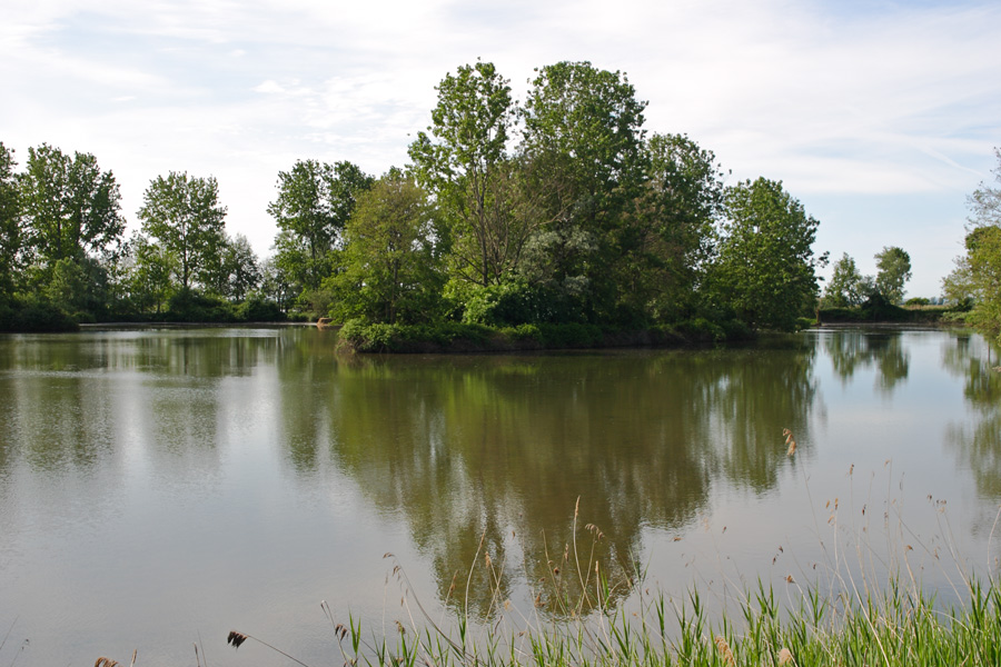 Scenario dell'oasi/palude di Casalbeltrame, Parco naturale delle Lame del Sesia, provincia di Novara